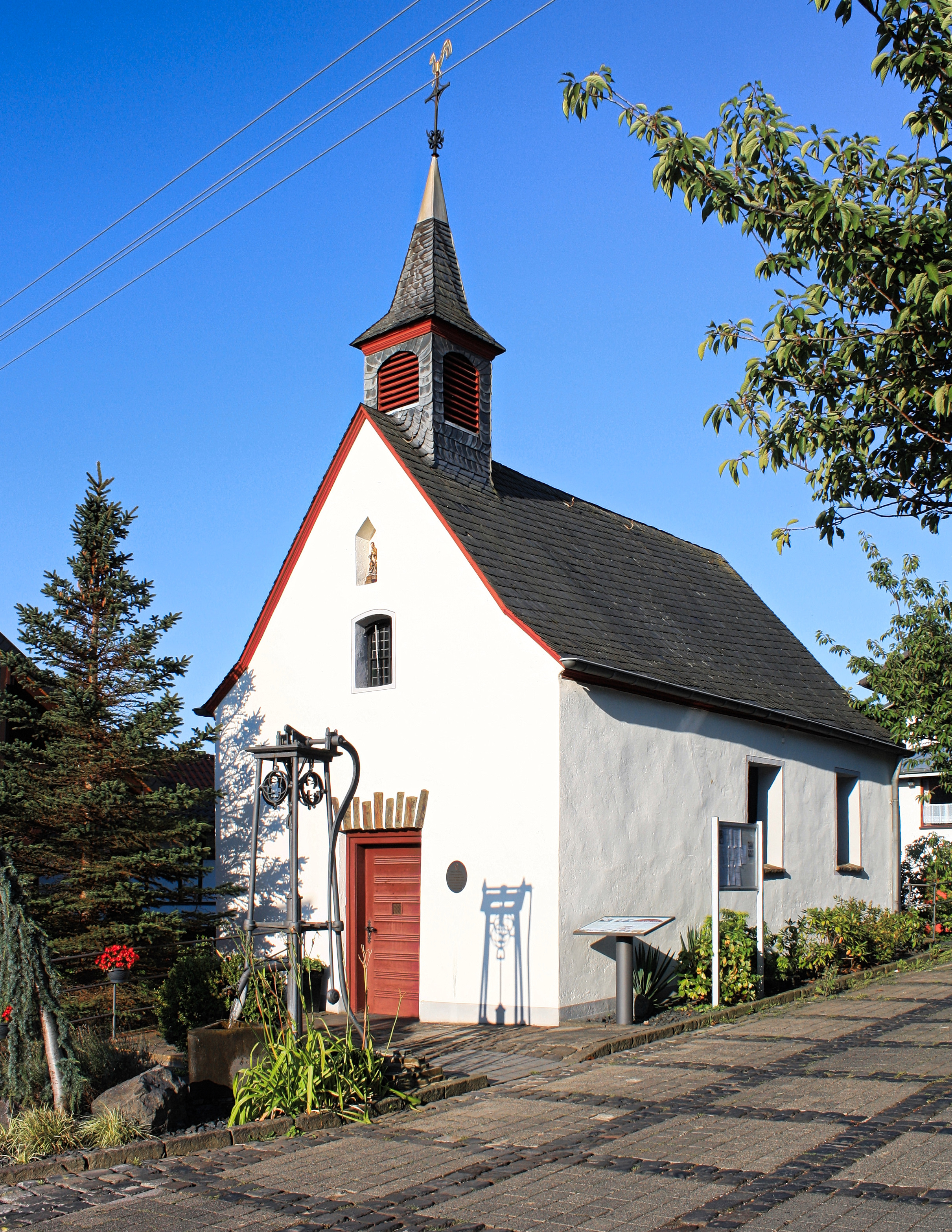 St. Hubertus